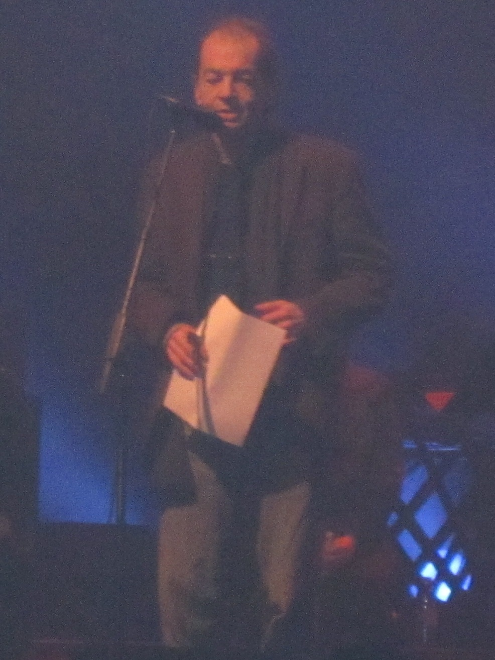 Gil Courtemanche au Show du Cadenas II.